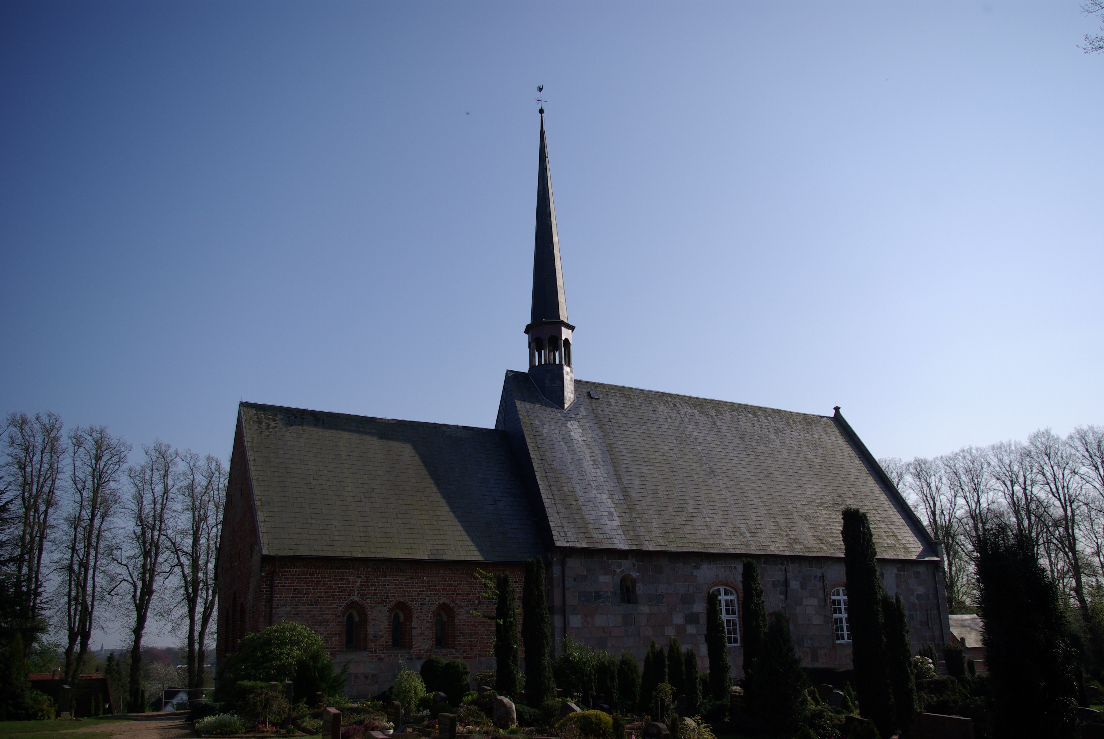 Norderbrarup in Schleswig-Holstein. Die Kirche steht unter Denkmalschutz.